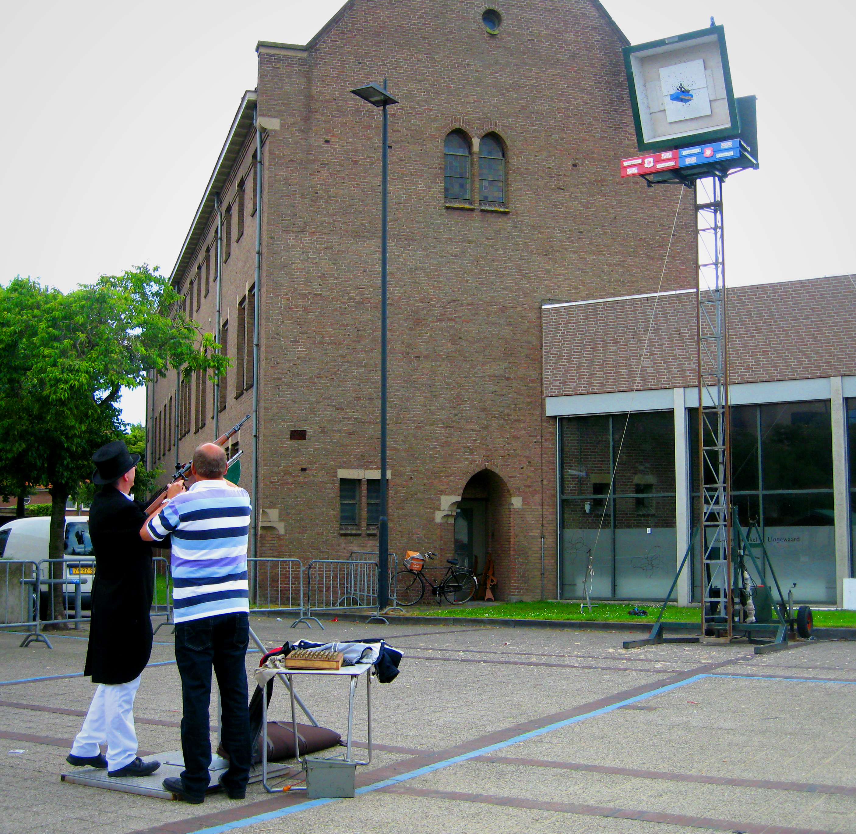 Een koningskandidaat doet een poging Koning te worden van het St. Laurentiusgilde.